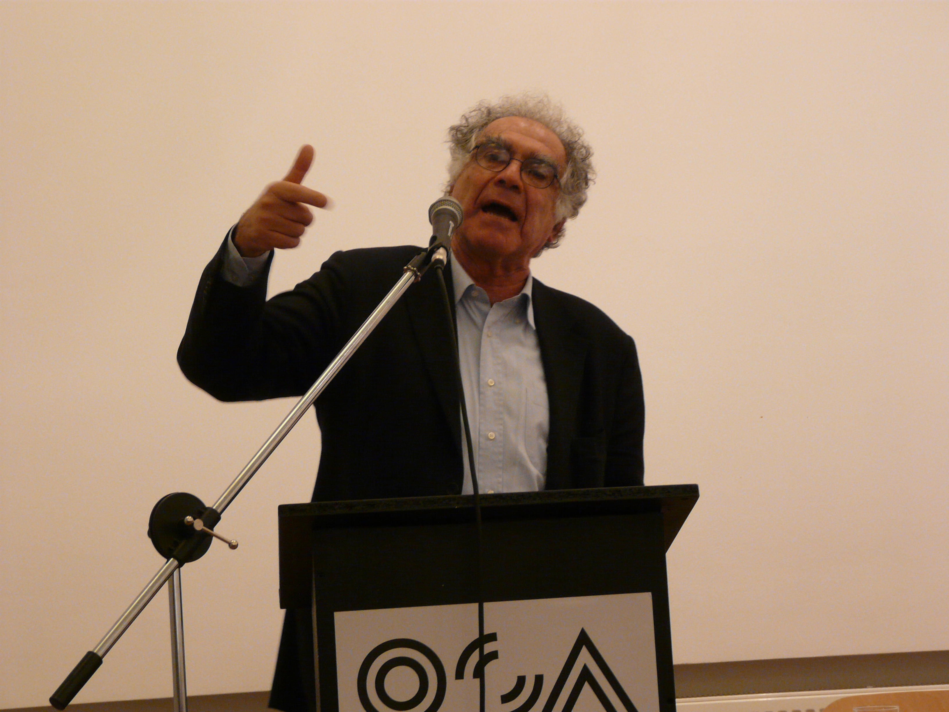 Carlo Ginzburg 1939 –ben született, Torinóban. Filozófiából doktorált 1961 –ben a Pisai Egyetemen. A felvétel idején a Scuola Normale Superiore di Pisa tanára. A felvétel a Nyilt Társadalom Intézetben (Budapest V. Arany János u. 32 szám) 2010. február 12 –én pénteken tartott előadásán készült. A mikrotörténésznek is aposztrofált Ginzburg detevtívként, nyomolvasóként kutat. Egyedi esetek elemzésével kutatja a formális tudás mellett az informálisat is. Ismert munkája a Sajt és a férgek című. A felvétel megjelent Creative Commons alatt a Metapolisz DVD sorozatban. Jürgen Schlumbohm: Mikrotörténelem – makrotörténelem, Szekeres András: Mikrotörténelem és általános történeti tudás